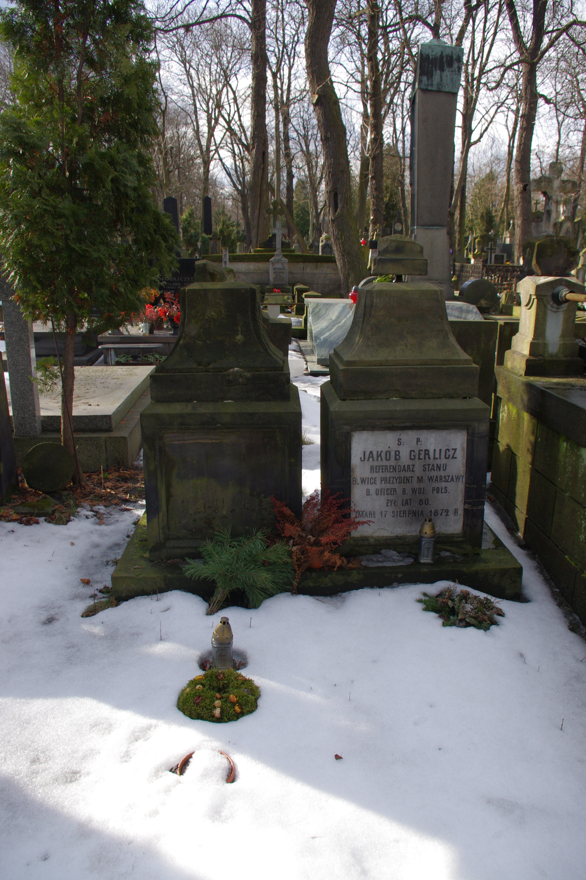 Grób Jakuba Gerlicza (1792-1872) - wiceprezydenta Warszawy, na Cmentarzu Powązkowskim w Warszawie